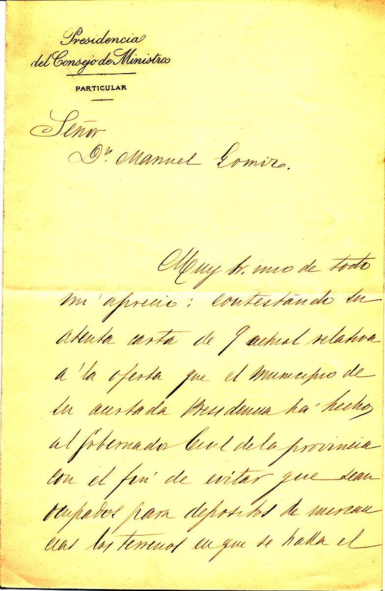 Anverso de carta del Presidente del Gobierno D. Antonio Cánovas a el alcalde de Alicante Manuel Gomiz